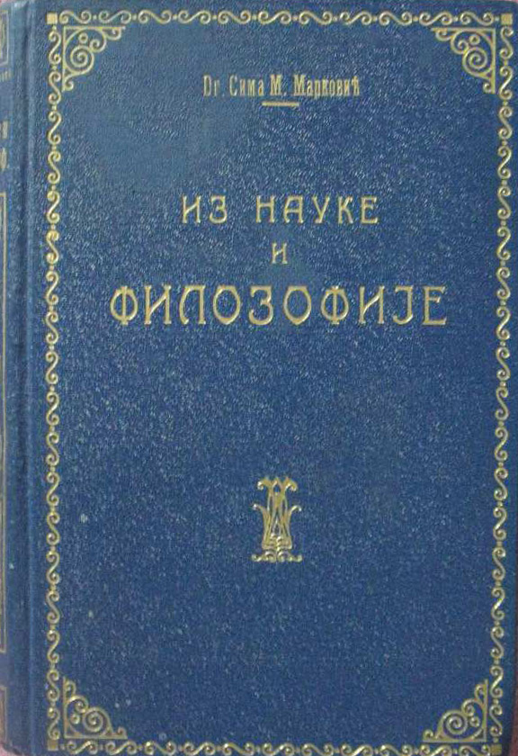 Srpskohrvatski / српскохрватски: Knjiga Sime Markovića "Iz nauke i filozofije".